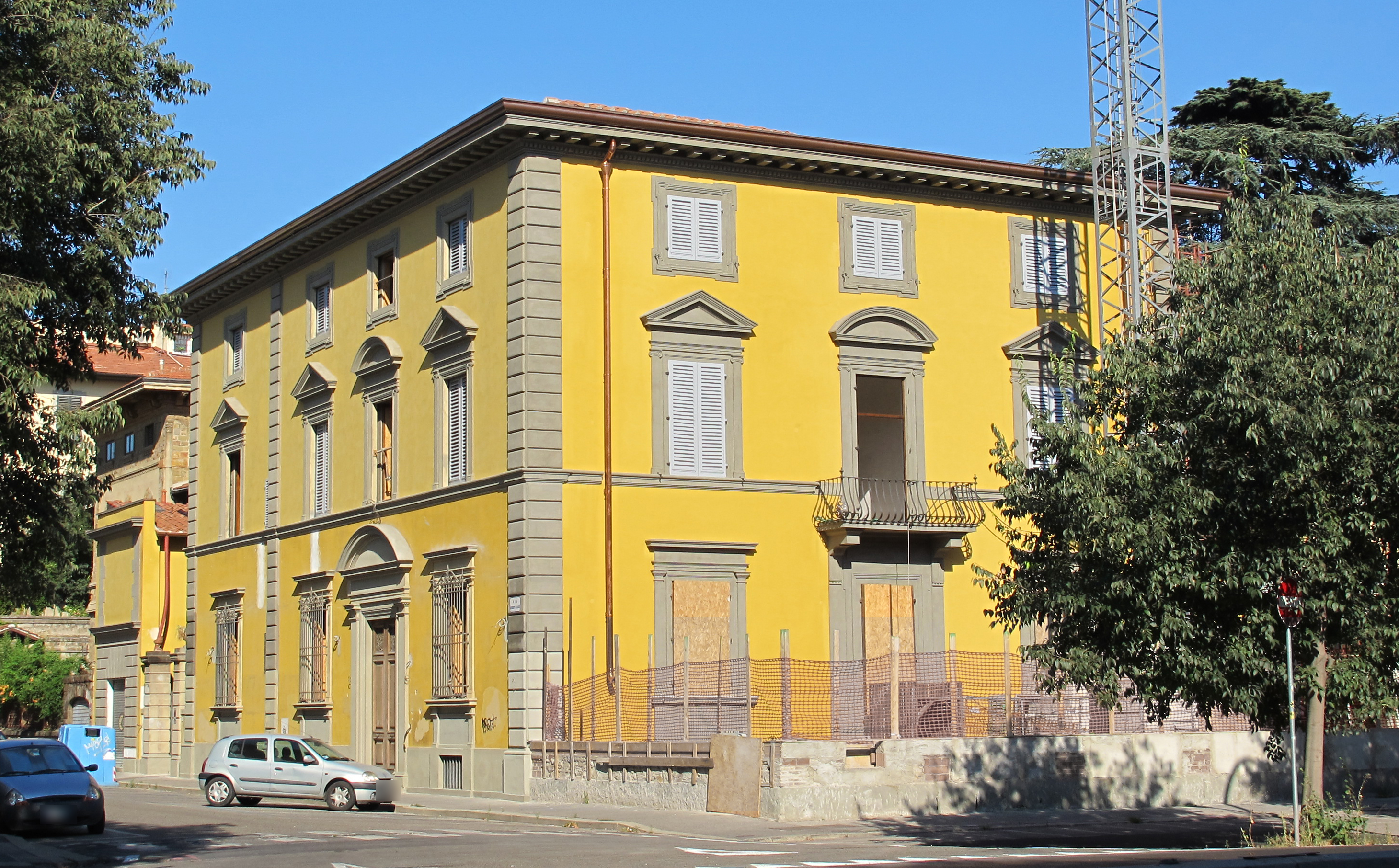 Viale Antonio Gramsci, Firenze